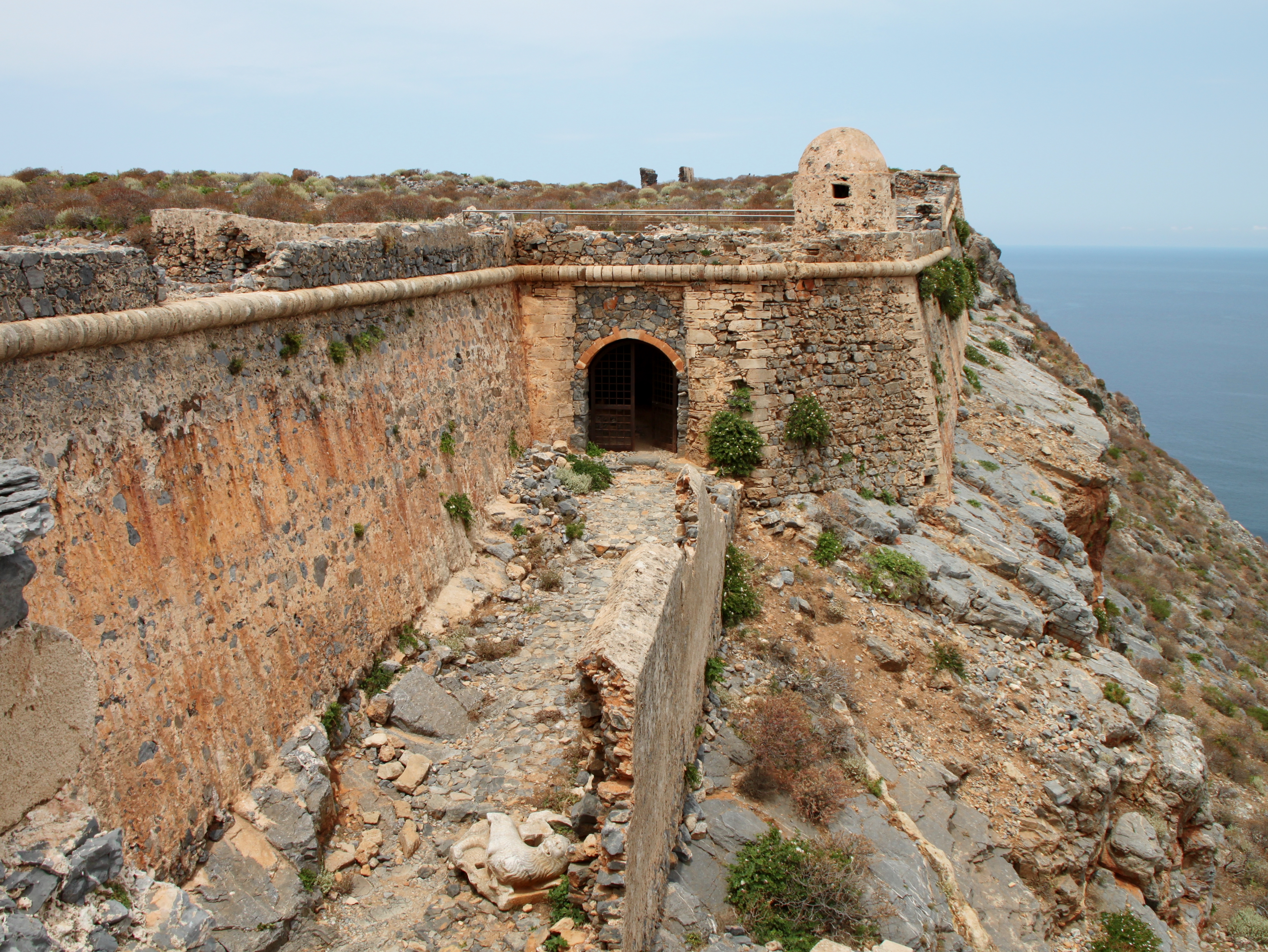 Festungsruine Kastro Gramvousas (Κάστρο Γραμβούσας) auf Imeri Gramvousa (Ήμερη Γραμβούσα), Insel in der Gemeinde Kissamos, Präfektur Chania, Kreta, Griechenland